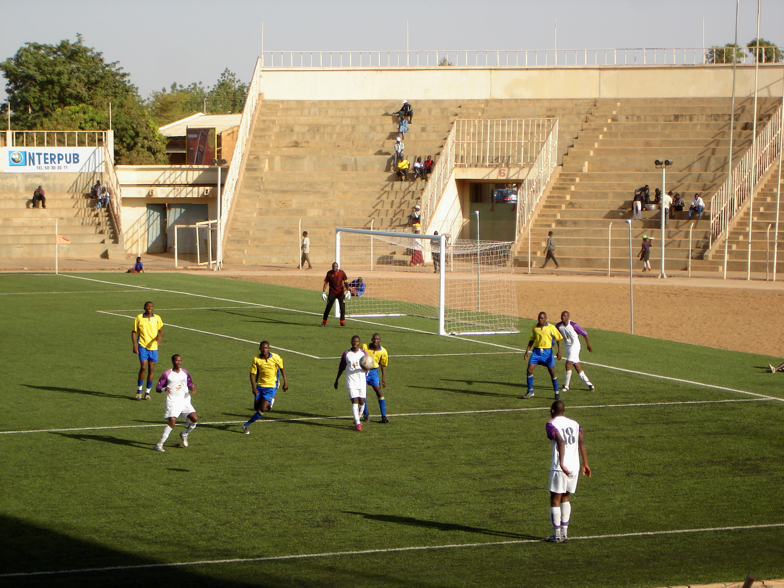 Burkina Faso: Erstligaspiel zwischen CF Ouagadougou und AS-SONABEL Ouagadougou